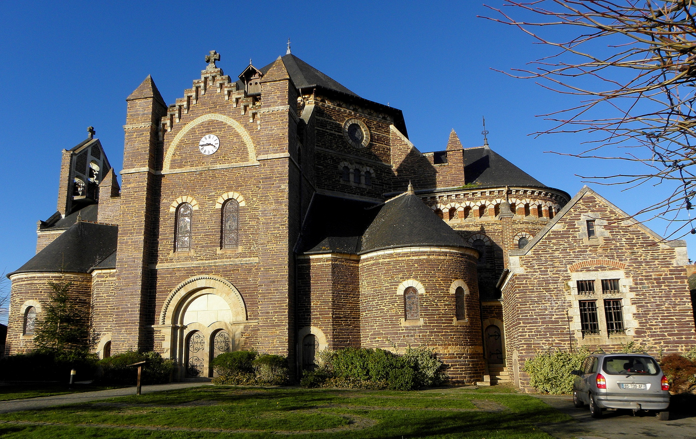 Église Saint-Maxent, commune de Maxent (35). Chevet et flanc sud.